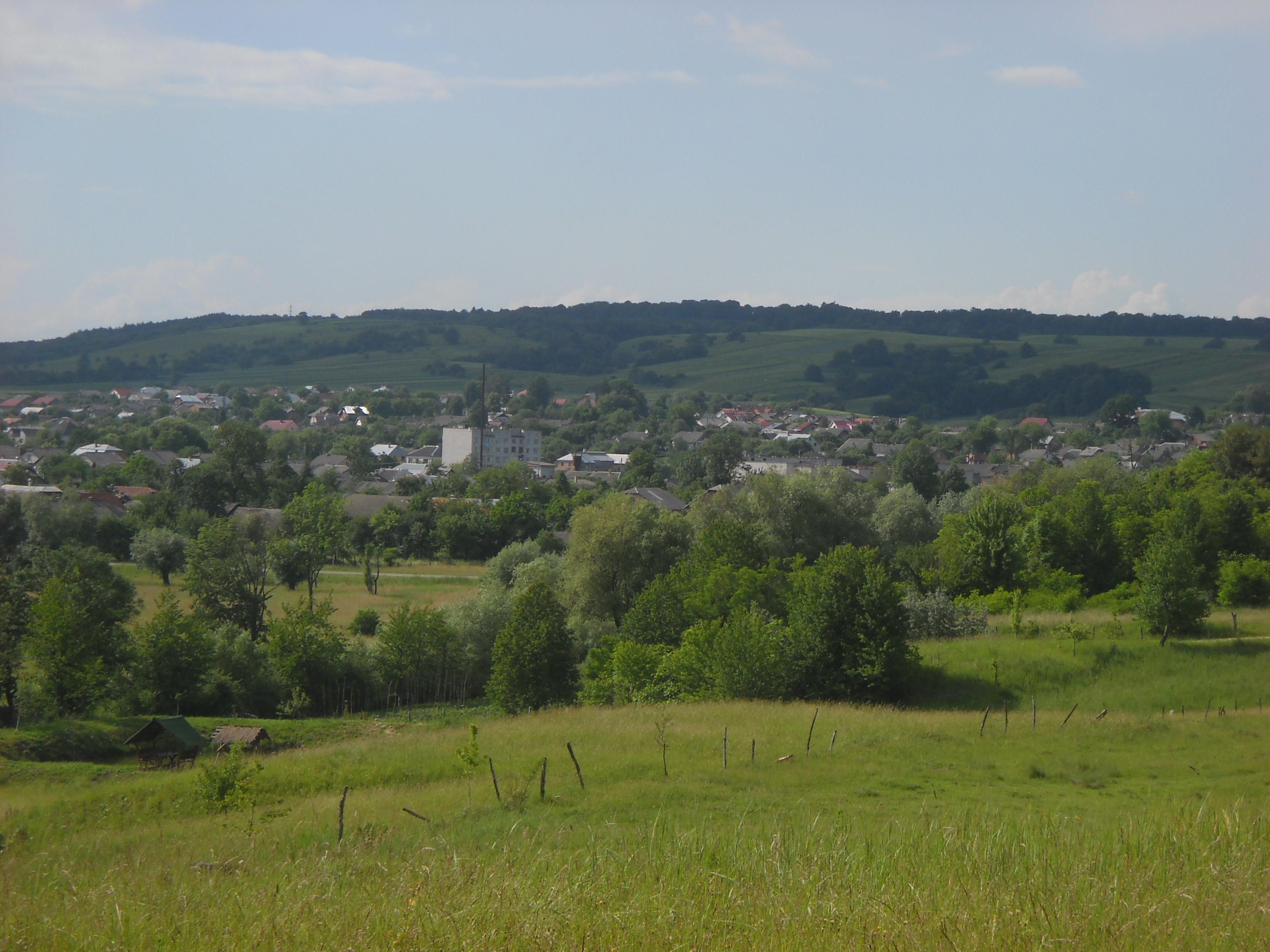 Панорама села Березина